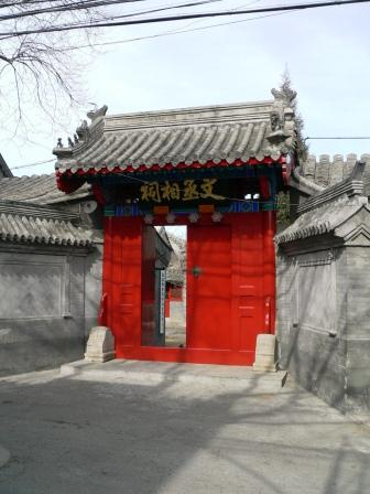 文丞相祠 拍摄